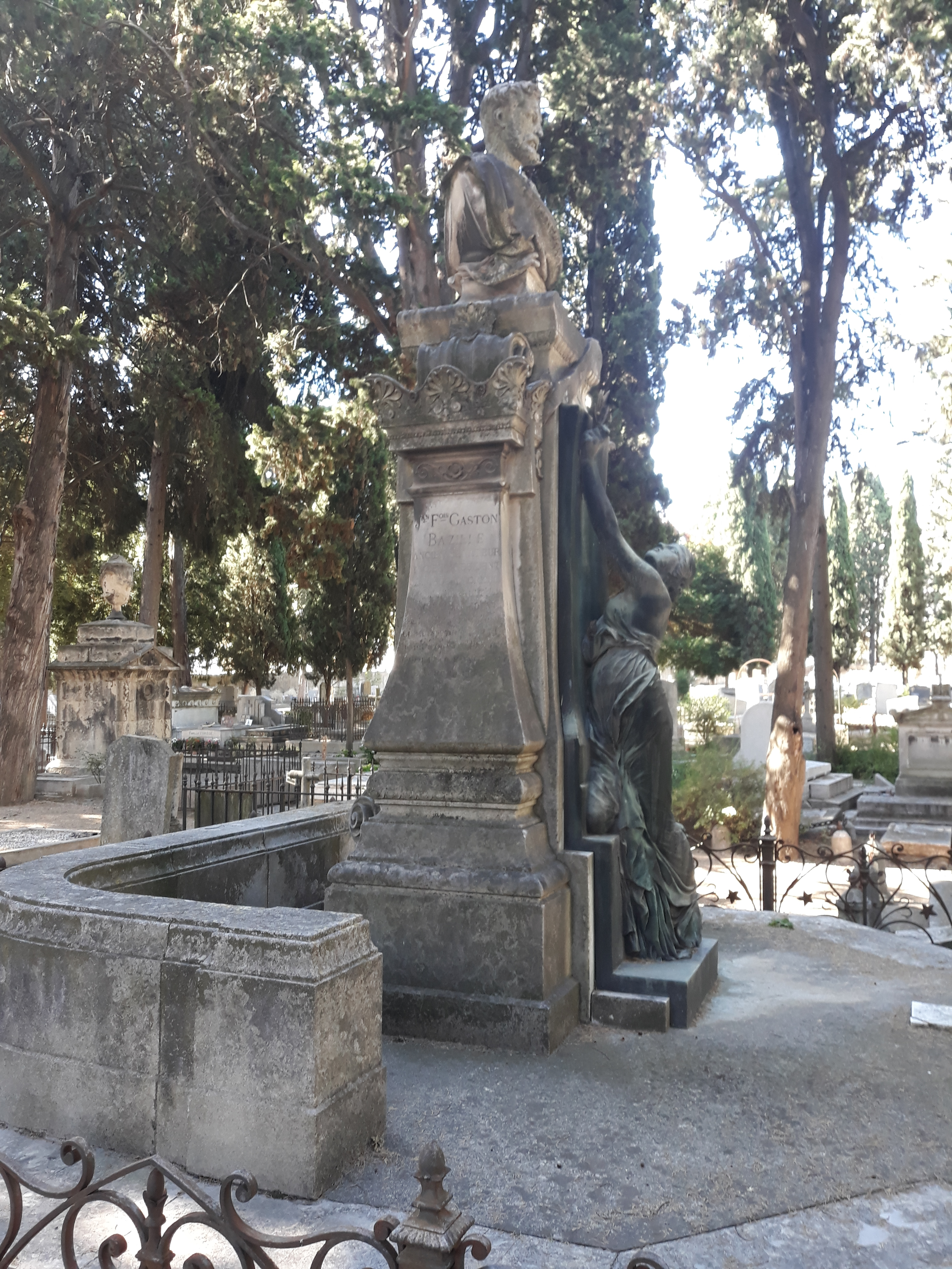 Das Familiengrab Bazille auf dem protestantischen Friedhof Montpellier, darunter der Politiker Gaston Bazille und der Male Frederic Bazille.